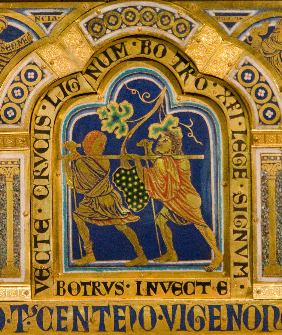 Detail vom Verduner Altar